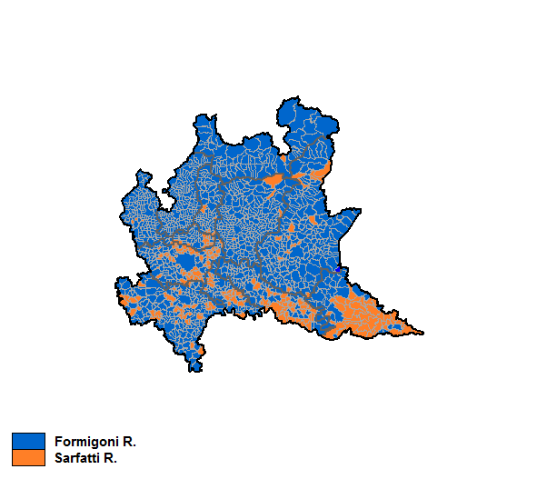 Candidati vincitori nei singoli comuni nelle Elezioni regionali in Lombardia del 2005.